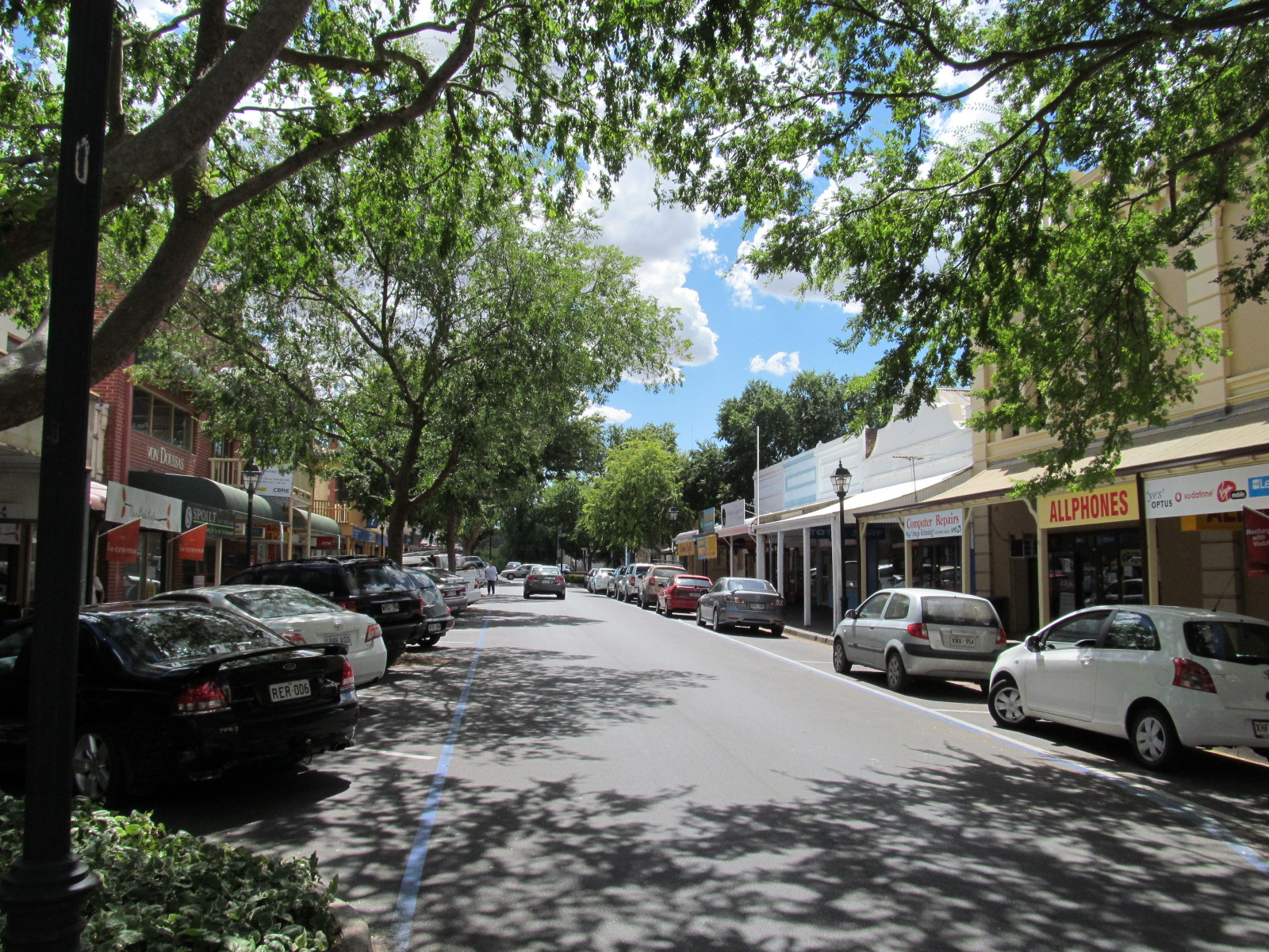 Gawler Street, Mount Barker.